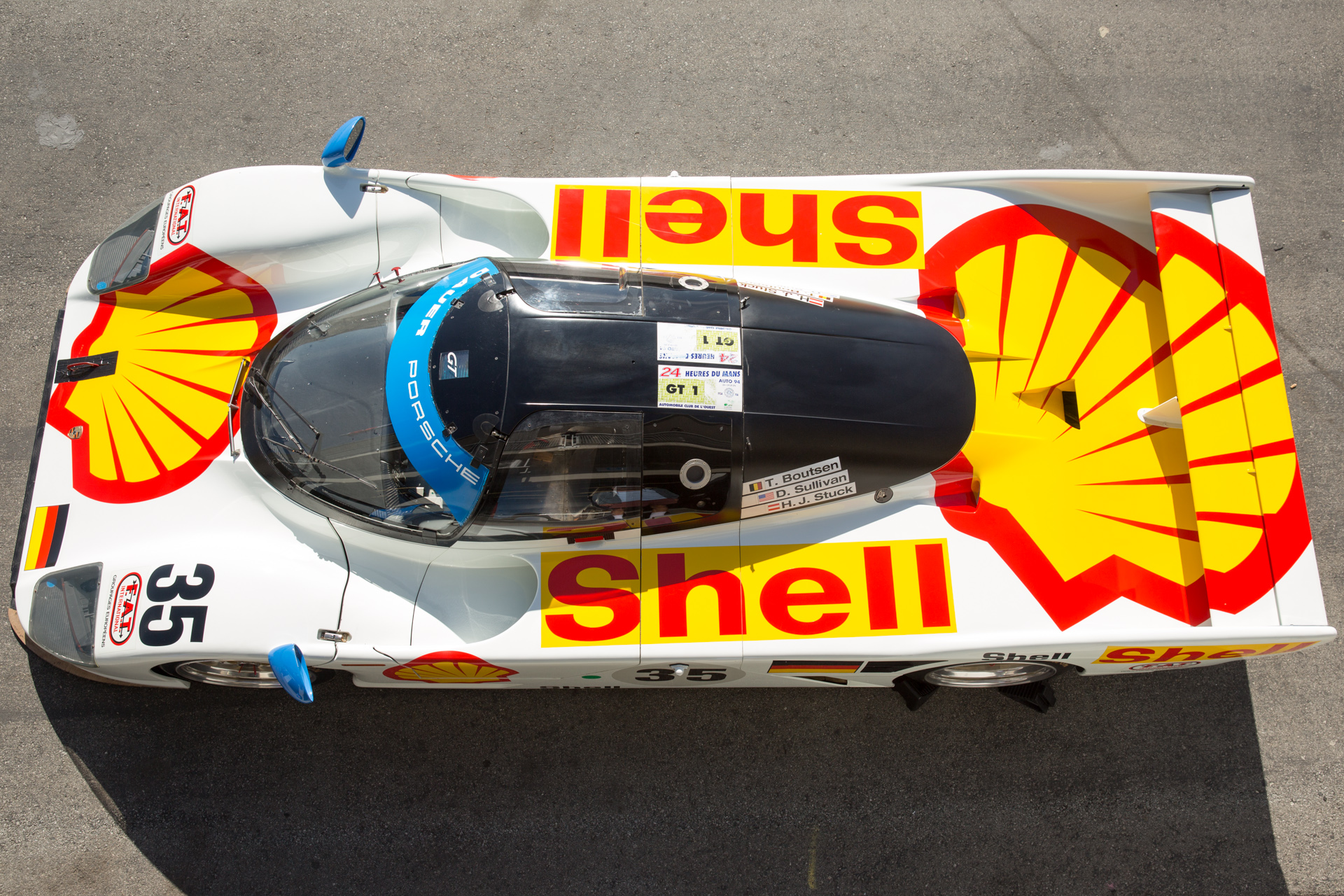 Rennsport Reunion V